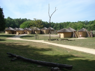 Nedersaksies: Berg_en_Dal.jpg